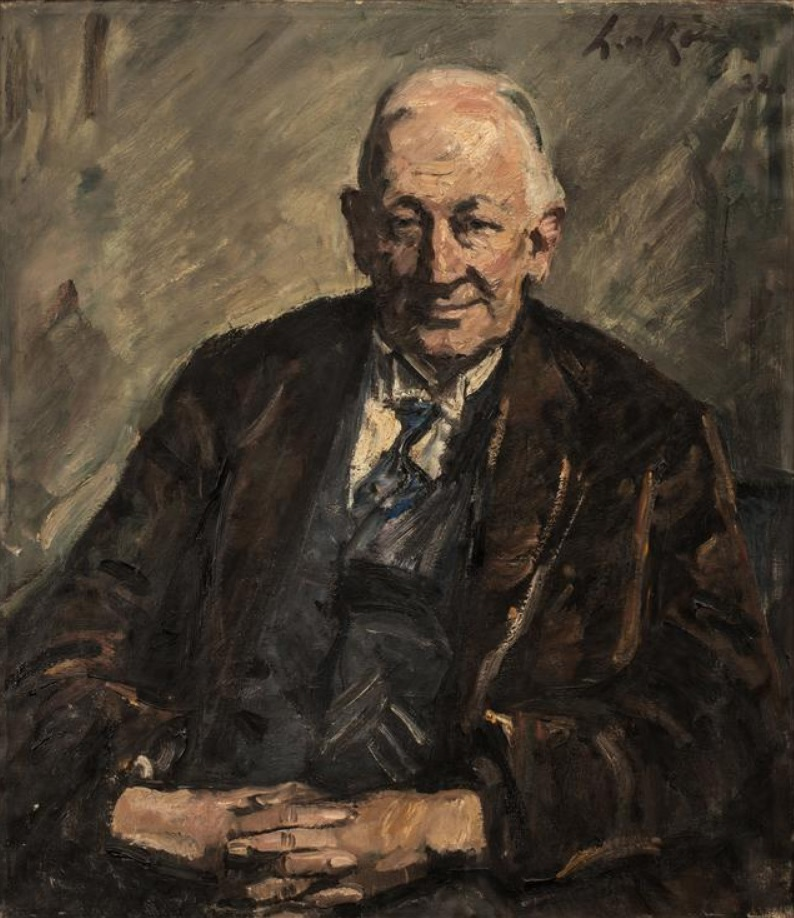 Leo von König - Portrait Albrecht Penck, 1932. Öl auf Lwd, H: 97 cm B: 85 cm